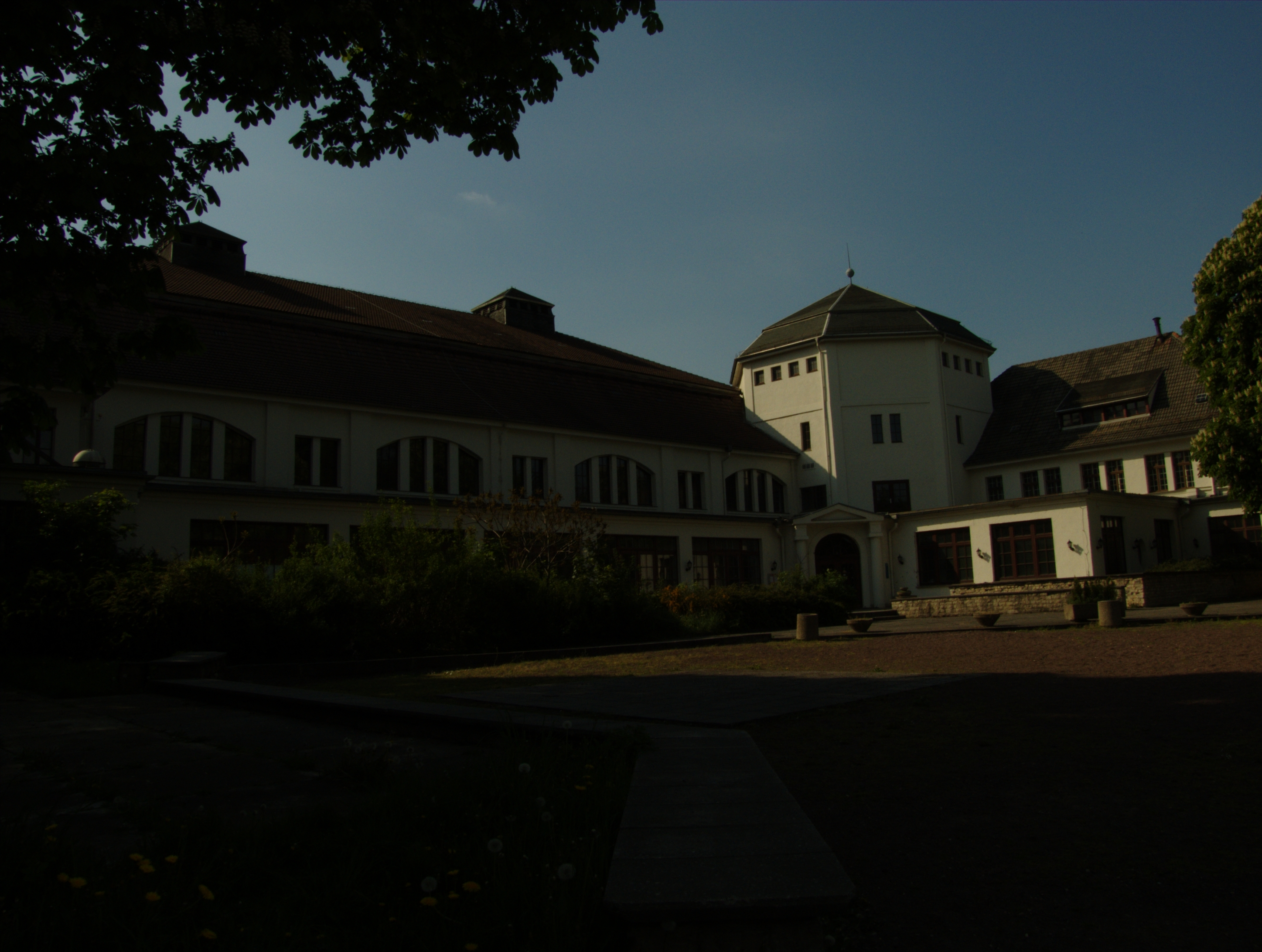 Haus Auensee in Leipzig/Germany